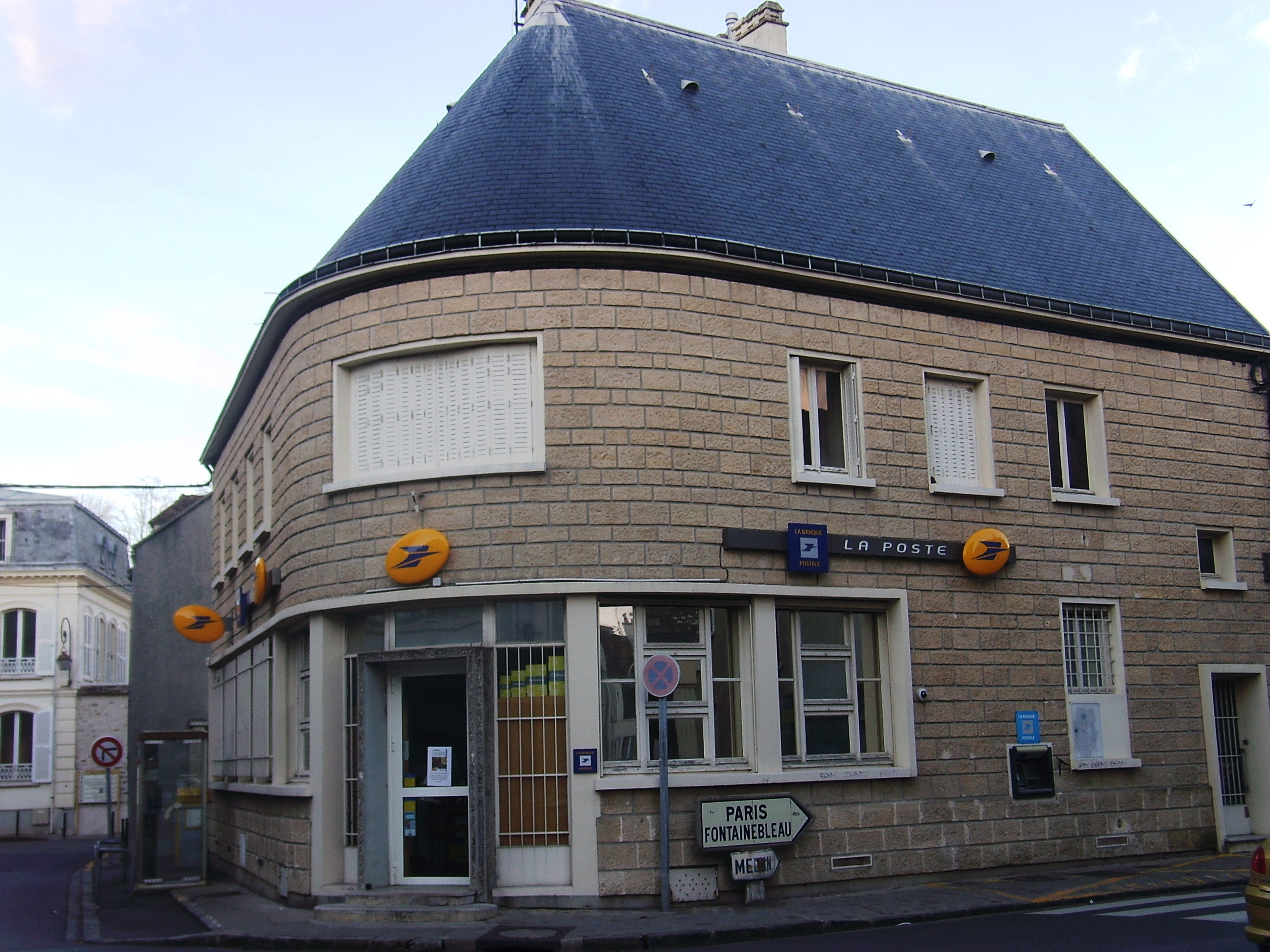 Hôtel des Postes à Milly-la-Forêt (91)